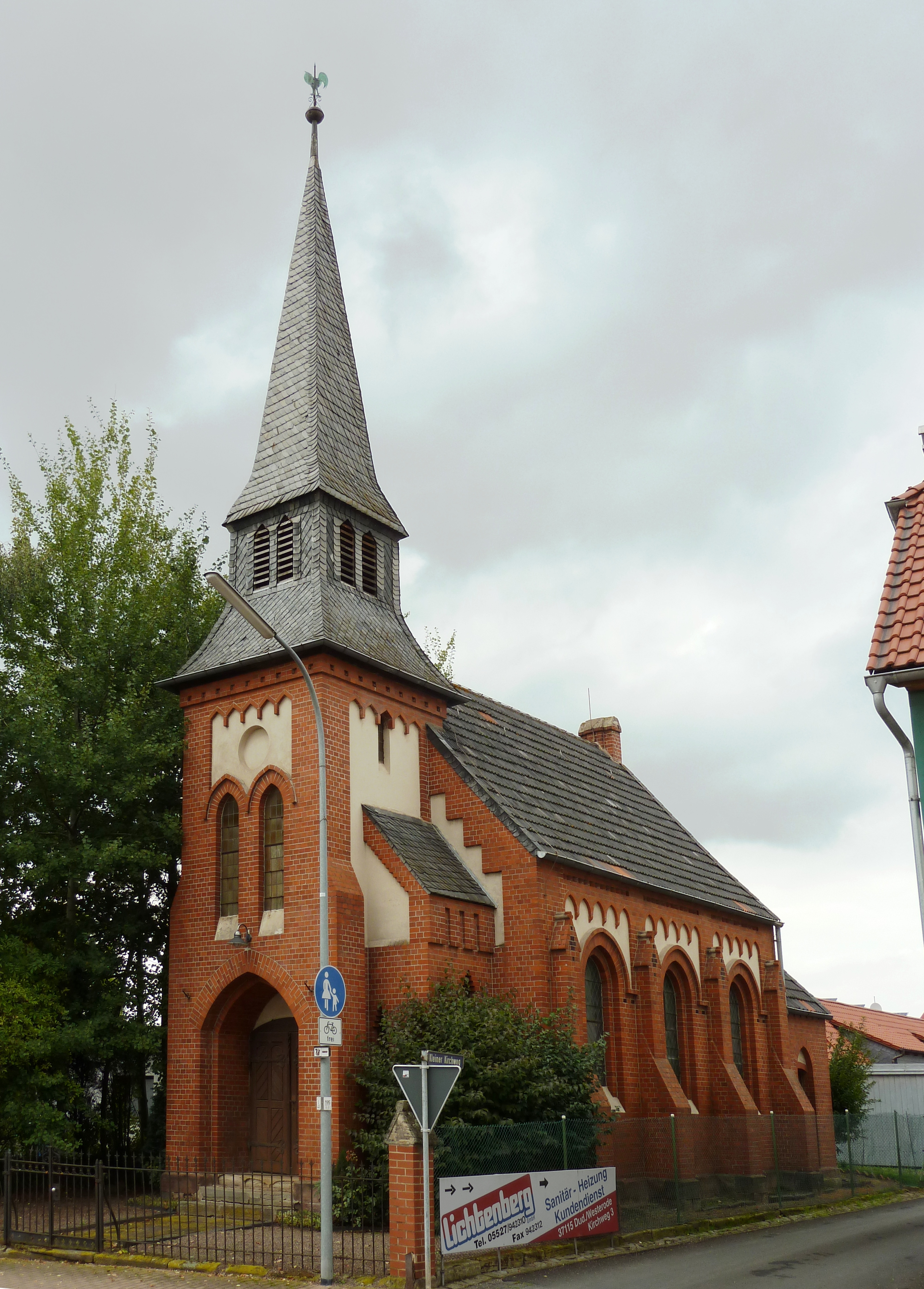 Evangelisch-lutherische Kapelle in Westerode, Duderstadt, niedersächsisches Eichsfeld. Erbaut 1901 durch Otto Bollweg (Architekt aus Hannover) als neugotischer Backsteinbau mit Putzflächen